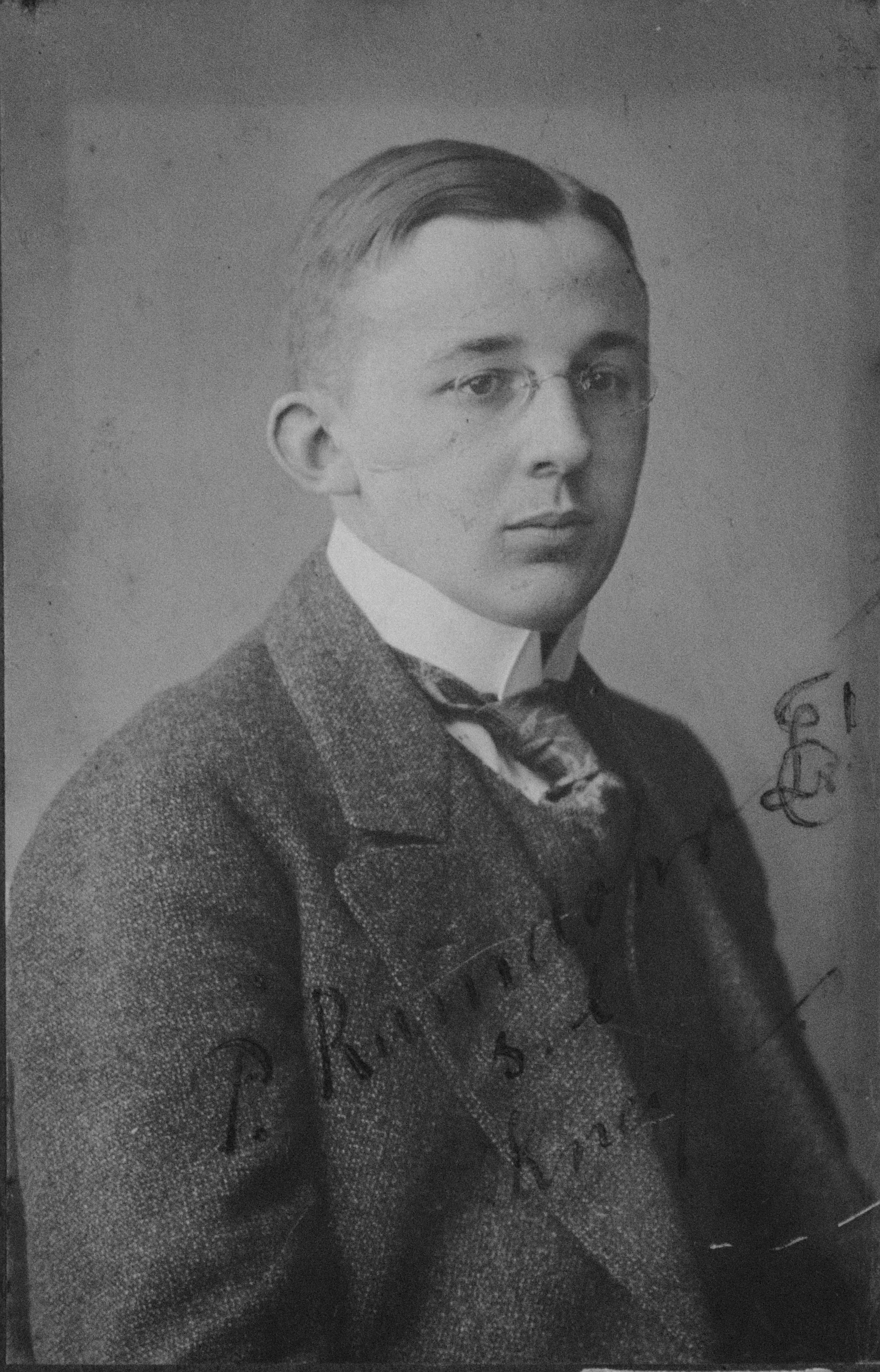 Fotografie von Paul Ramdohr als Mitglied der Studentenverbindung Leonensia. In der rechten Bildmitte befindet sich der Zirkel der Verbindung Leonensia. Standort der Fotografie: Ahnengalerie im Conventssaal der Verbindung Leonensia